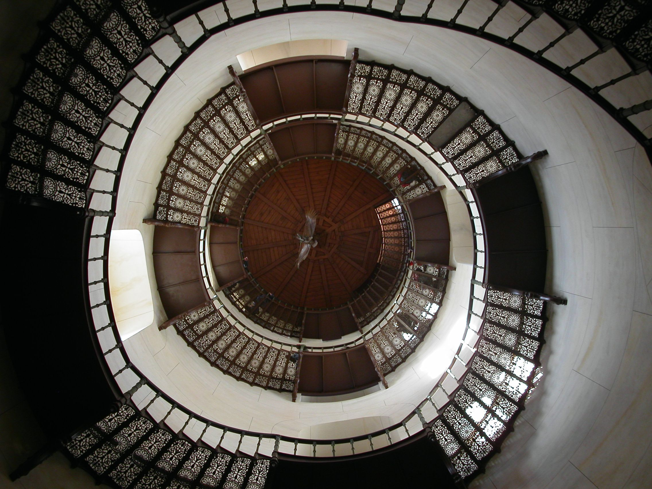 Turmtreppe im Jagdschloss Granitz auf der Insel Rügen